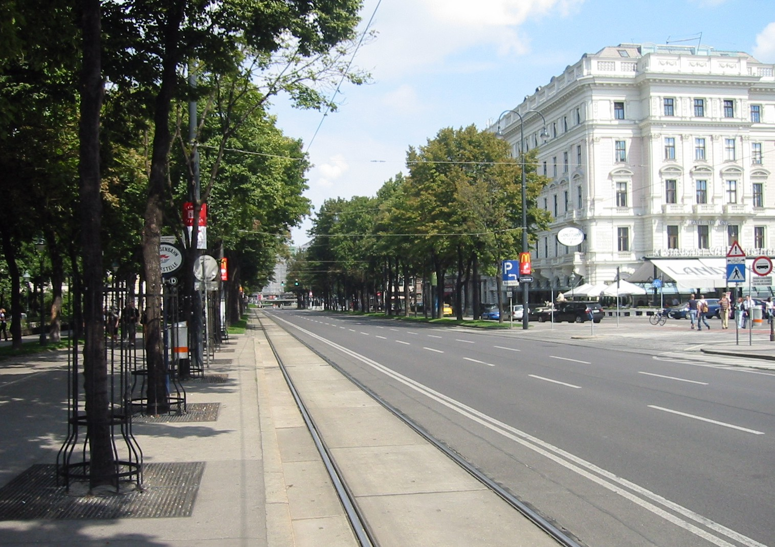 Wien, Ringstraße